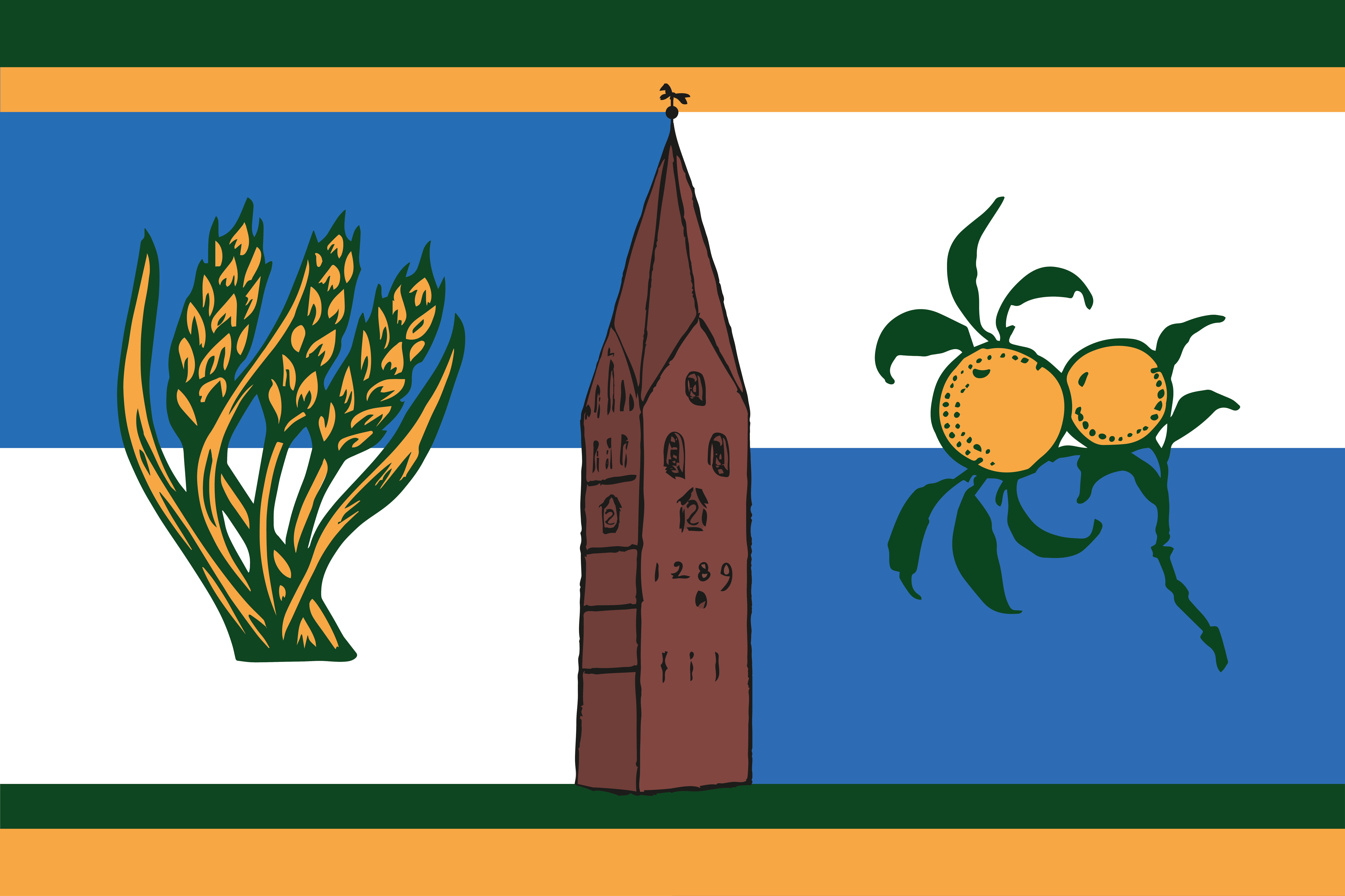 Deze dorpsvlag is ontworpen in opdracht van Vereniging Dorpsbelangen door Jaron Smedes van den Berg. De kleuren en symbolen zoals zichtbaar op de vlag verwijzen naar de cultuurhistorische geschiedenis van het dorp.